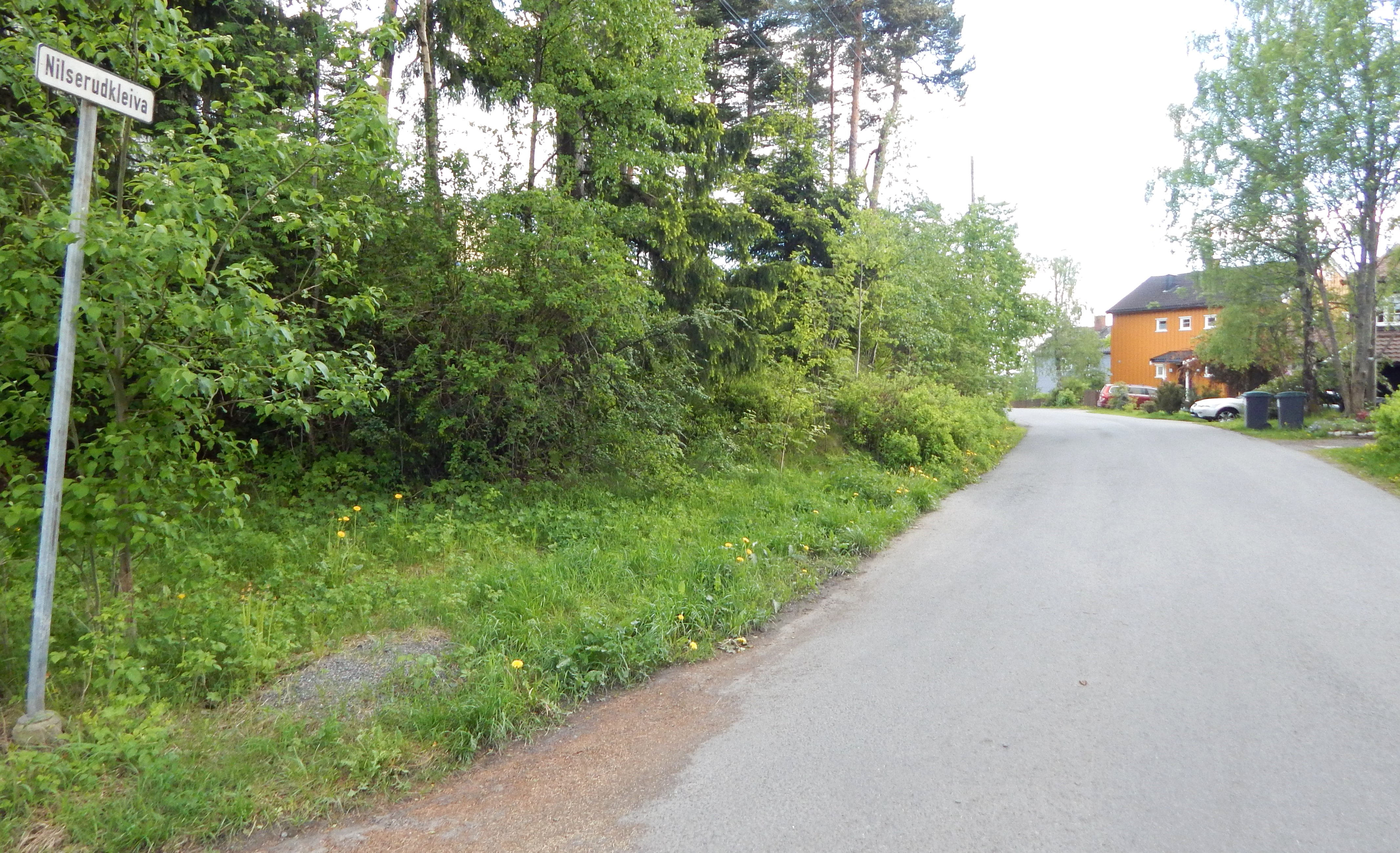 Nilserudkleiva ved Peder Ankers vei